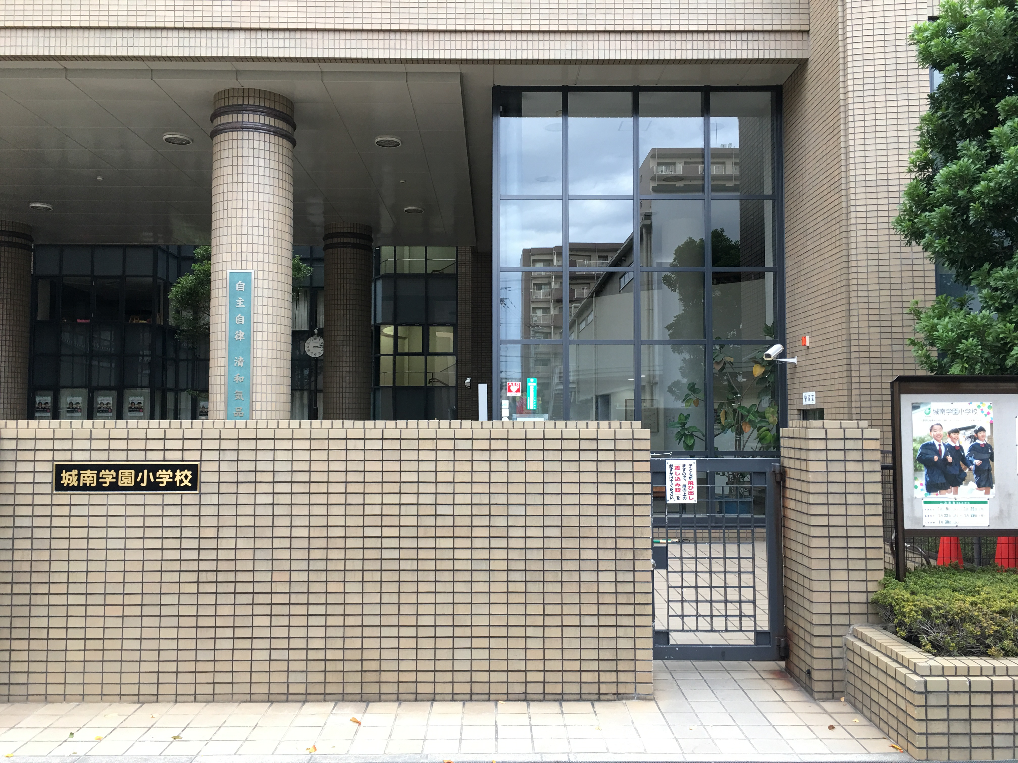 城南学園小学校